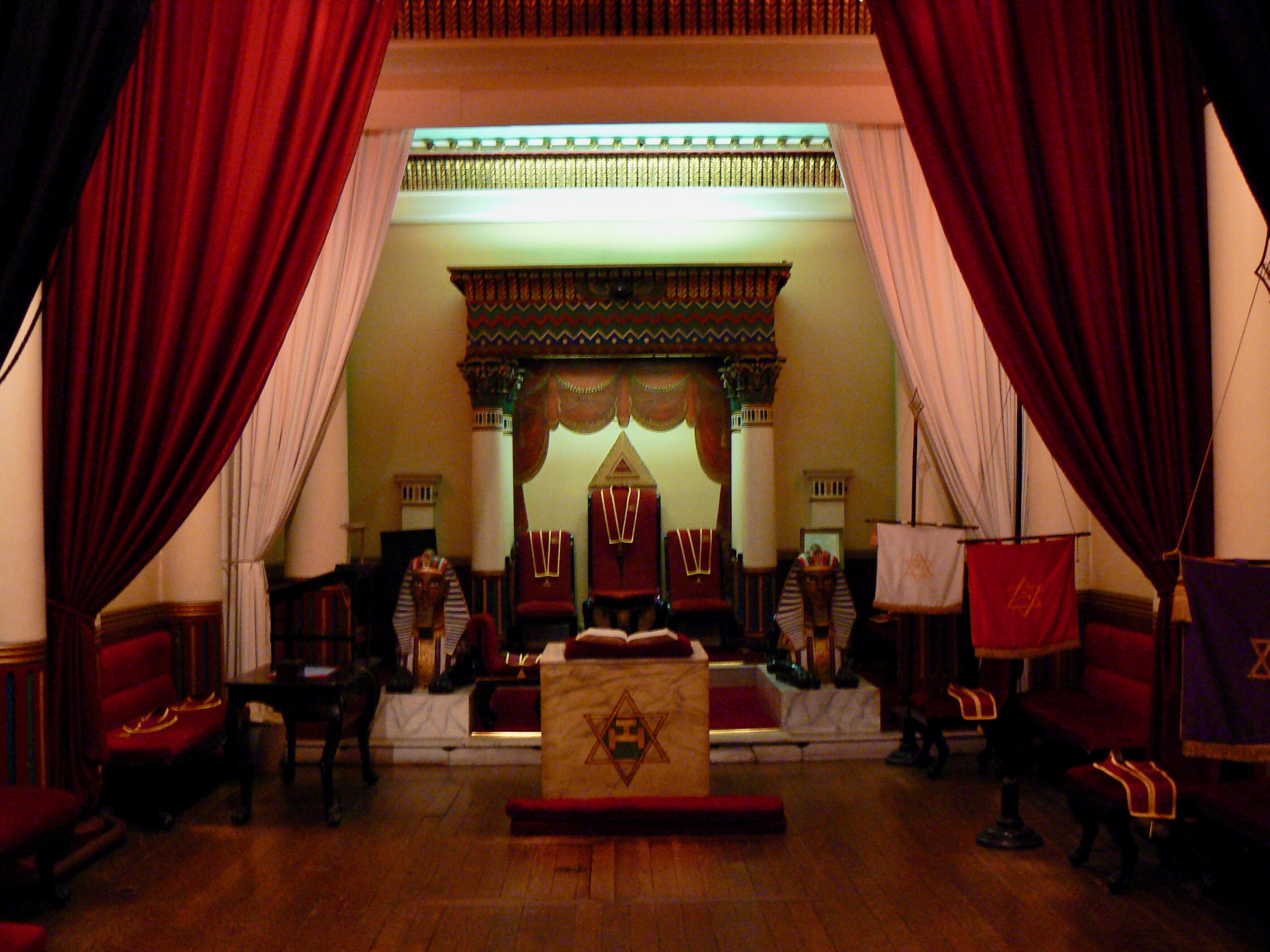 Royal Arch chapter, Dublin